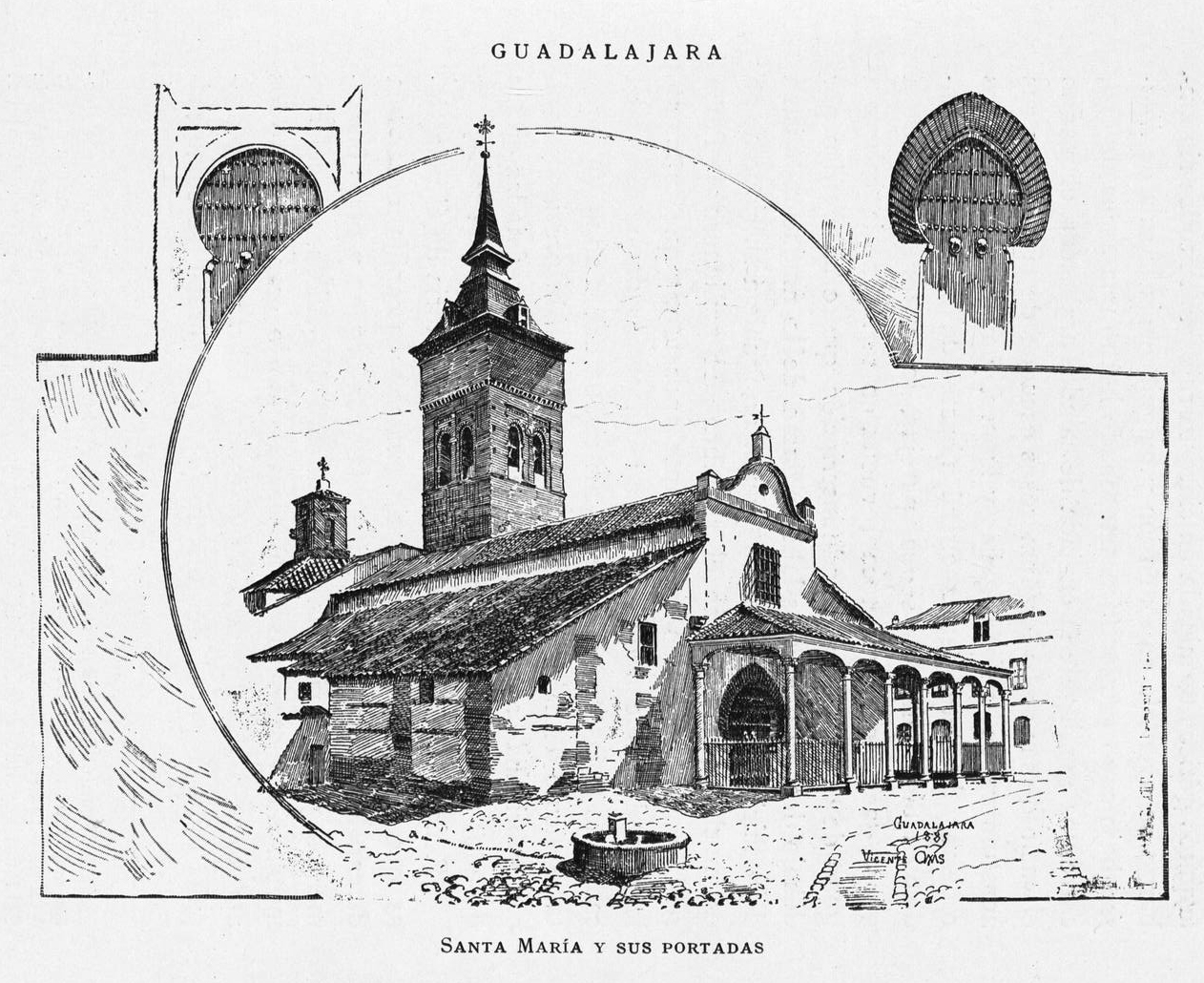 Santa María y sus portadas, en Guadalajara.